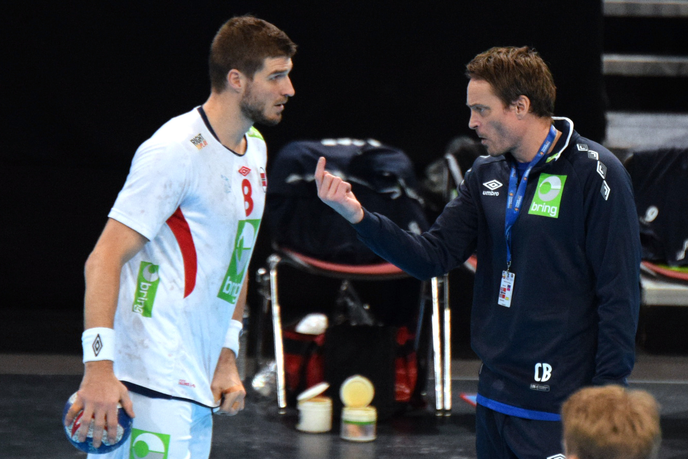 Bjarte Myrhol et Christian Berge , le 10 janier 2016 lors du match Norège / Qatar durant la Golden League à l'AccordHotel Arena (Paris).